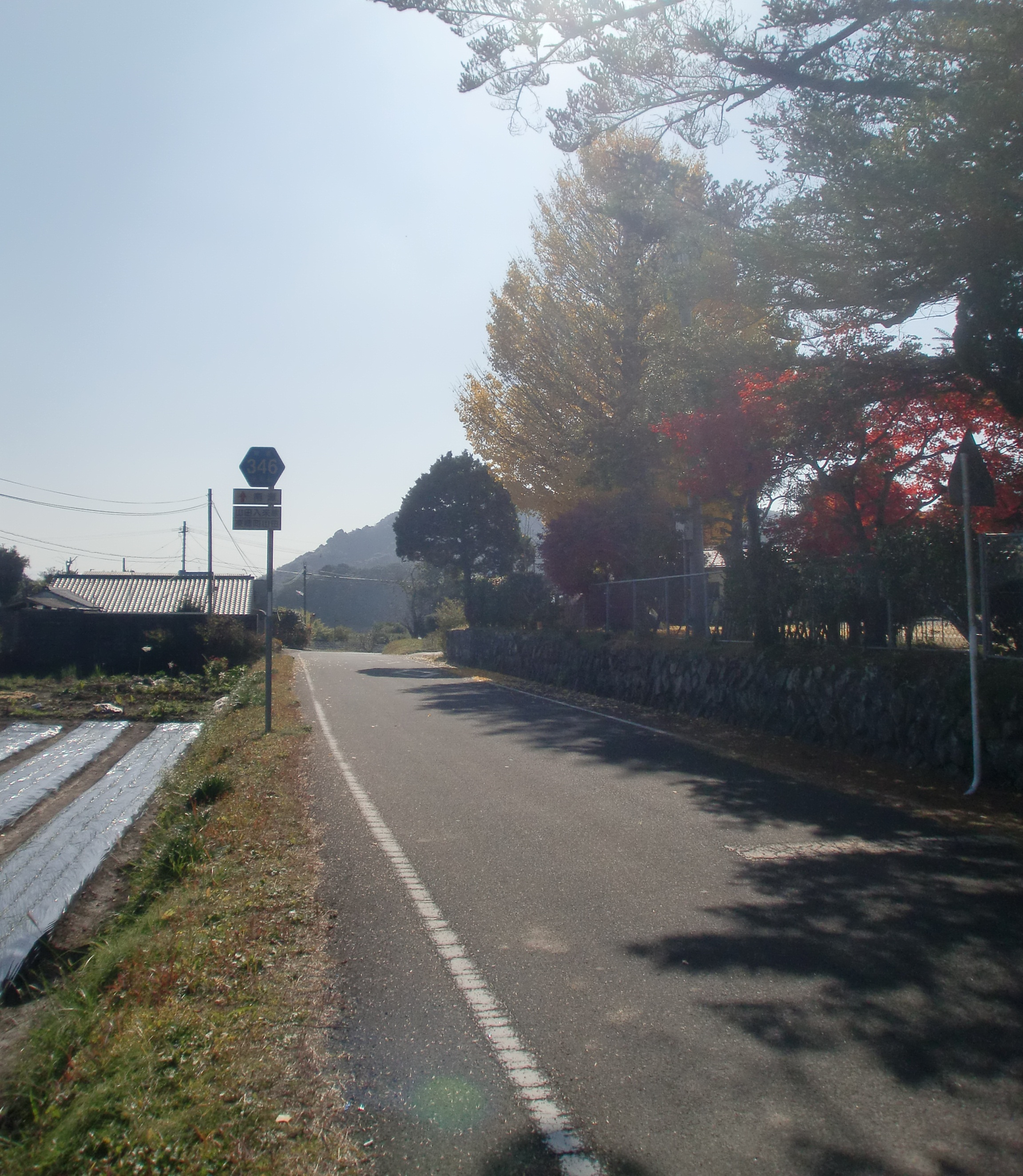 鹿児島県道346号山田入来線を東郷町山田にある山田小学校前より、国道267号方面を望む。